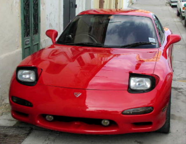 Mazda RX-7 3rd Generation